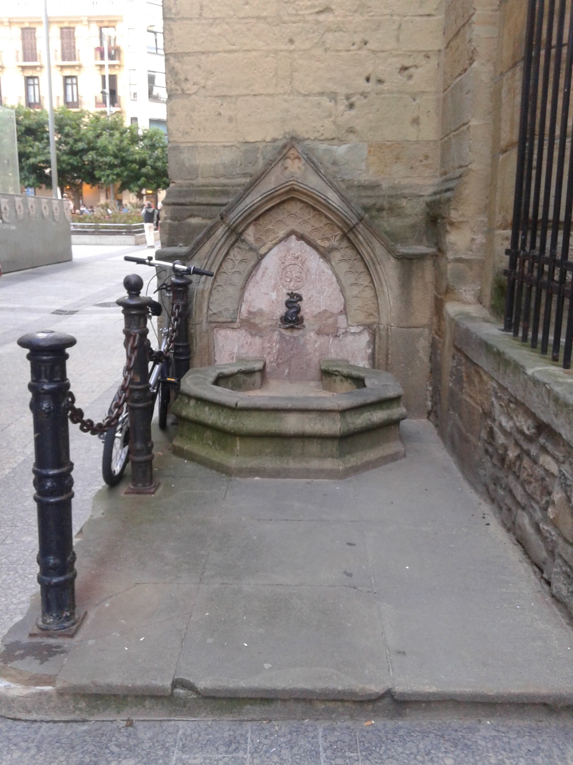 Parte-Zaharreko iturria